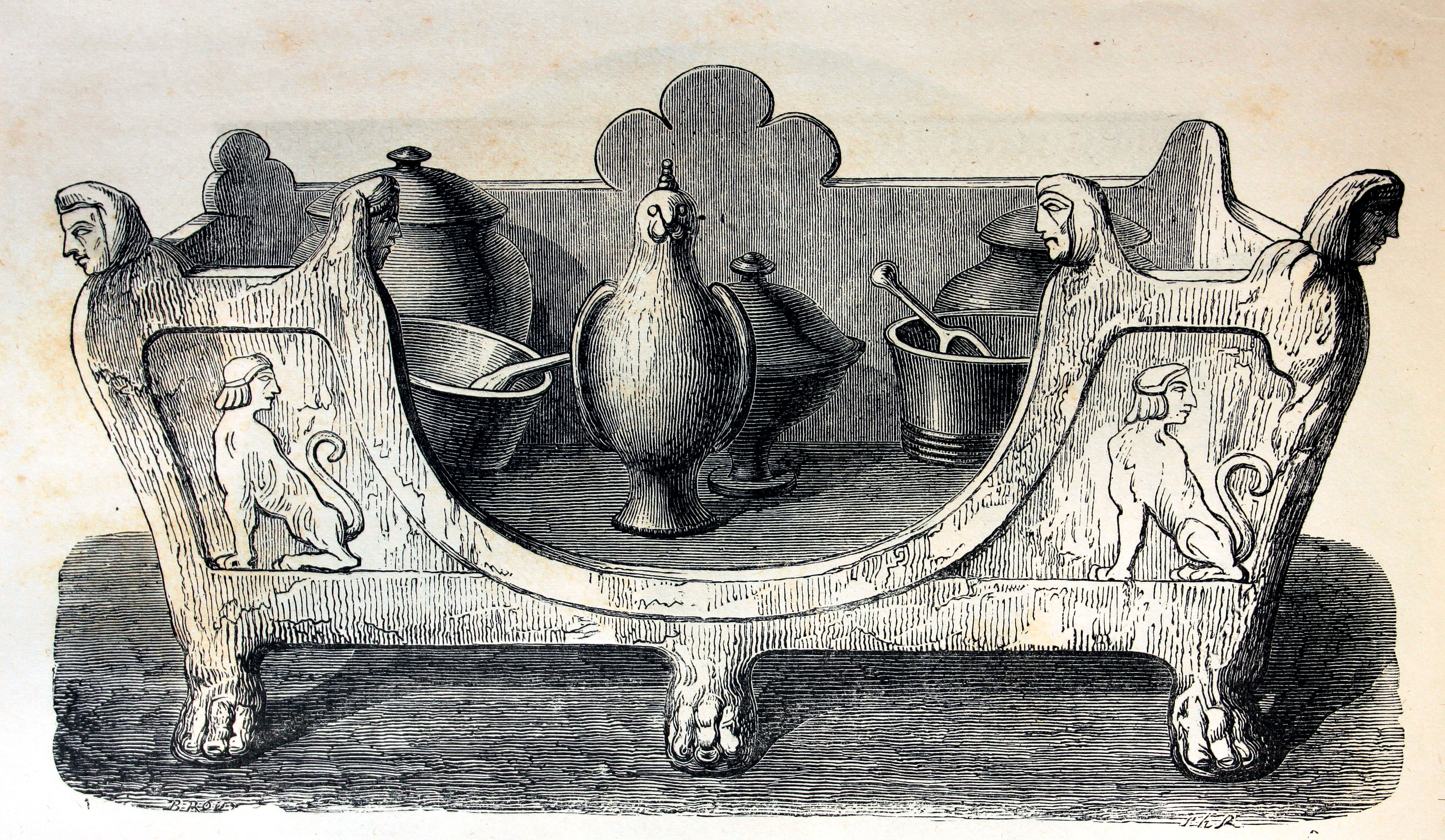 Ilustraciones de la obra : Les merveilles de l'industrie ou, Description des principales industries modernes / par Louis Figuier. - Paris : Furne, Jouvet, [1873-1877]. - Tome I